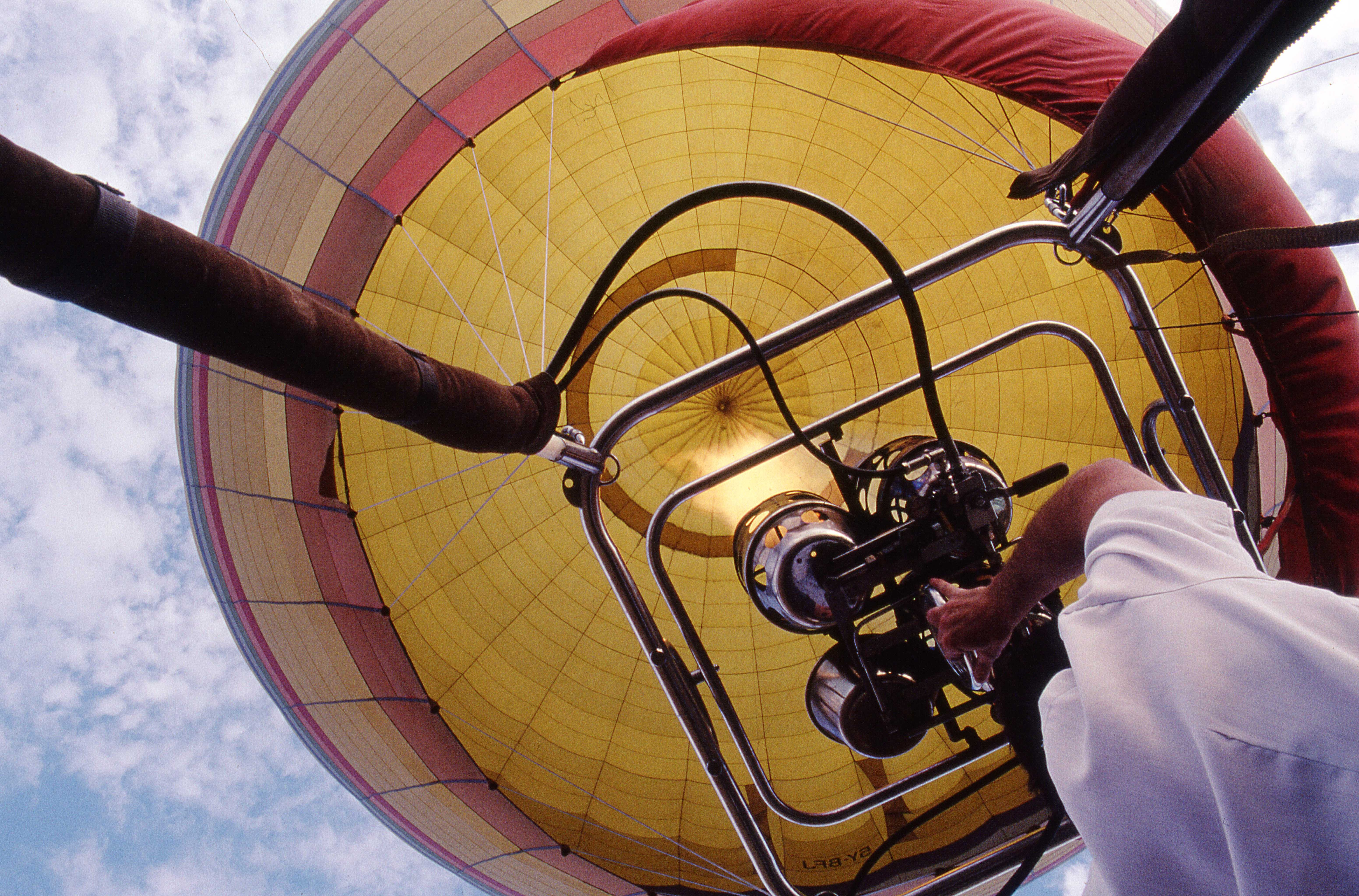 Maasai_Mara_699.jpg KENYA